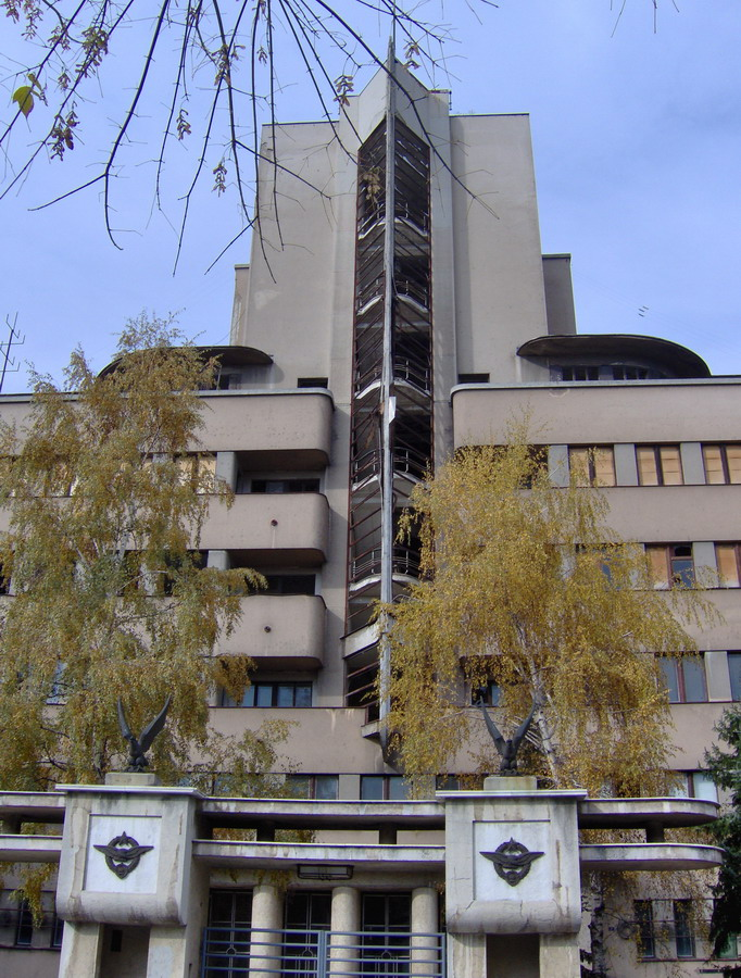 Зграда Команде ваздухопловства у Земуну, оштећена у НАТО бомбардовању 1999.